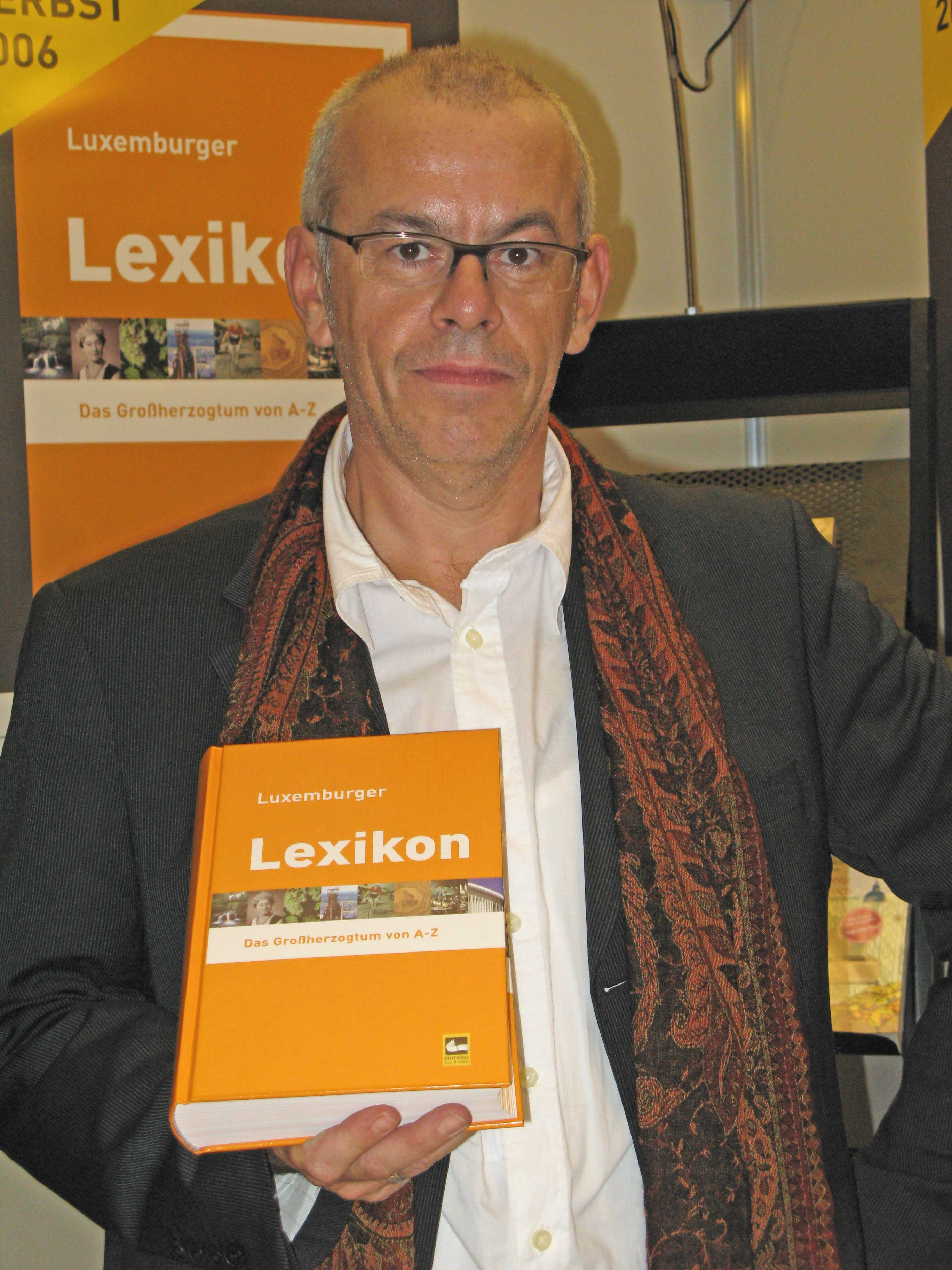 LuxLex.